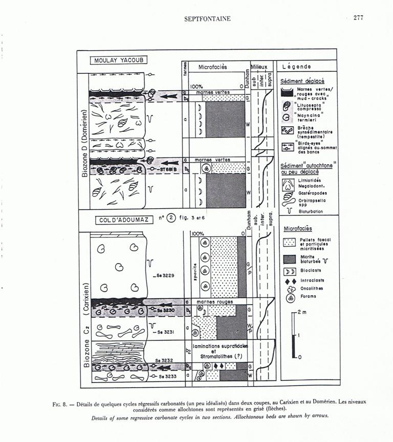 Détails de quelques cycles régressifs carbonatés de comblement liasiques pris dans deux coupes géologiques (rides sud-rifaines et Haut Atlas de Beni Mellal) distantes de 230 km. Les couches sont datées du Carixien et du Domérien grâce aux grands foraminifères très abondants (orbitopsellidés s.l. et Planisepta compressa etc.). Les niveaux à foraminifères allochtones (déplacés par les courants de marée et/ou les tempêtes) sont indiqués en grisé. Ces niveaux présentent de nombreuses figures diagénétiques typiques du milieu vadose (ciment ménisque, stalactite, "birdseyes" etc; voir photos ci-dessous). Au col d'Adoumaz, la couche Se 3229 (2m.) très riche en foraminifères déplacés est probablement un dépôt de tsunami.